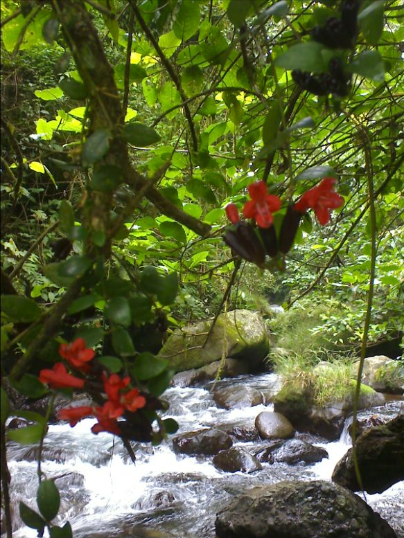 Anggrek hulu cibeet.